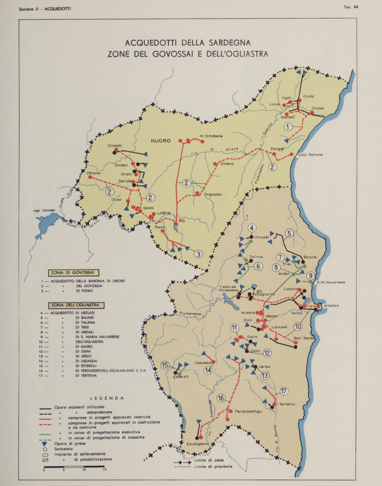 Si noti che la situazione attuale non è molto differente da quella progettata o realizzata in questa pianta.